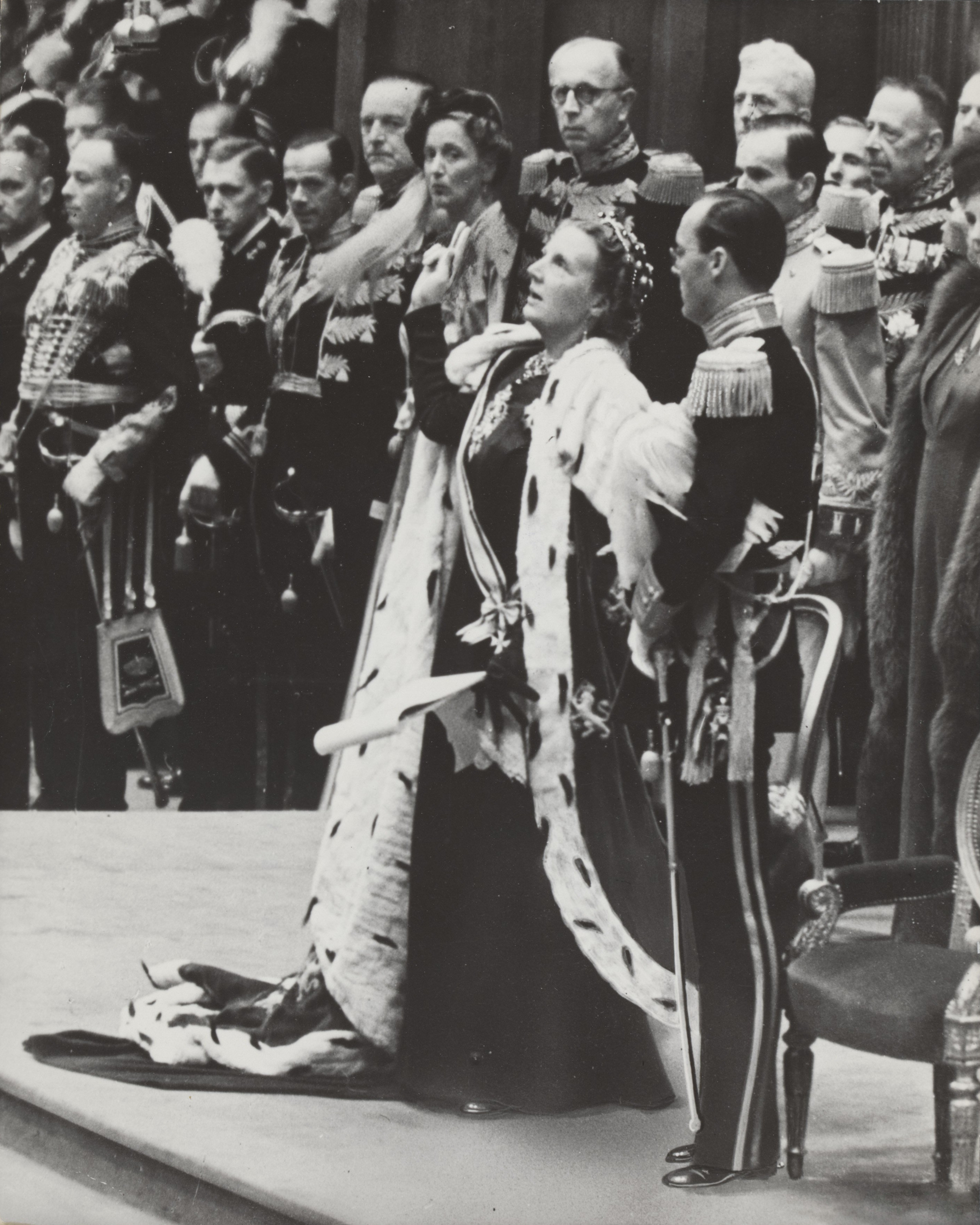 Collectie / Archief : Fotocollectie Elsevier Reportage / Serie : [ onbekend ] Beschrijving : Inhuldiging van koningin Juliana. De eed of belofte op de grondwet Datum : 6 september 1948 Locatie : Amsterdam, Noord-Holland Trefwoorden : inhuldigingen, kerken, koninginnen, koninklijk huis, prinsen Persoonsnaam : Bernhard, prins, Juliana, koningin Fotograaf : Fotograaf Onbekend / Anefo Auteursrechthebbende : Nationaal Archief Materiaalsoort : Foto (zwart/wit) Nummer archiefinventaris : bekijk toegang 2.24.05.02 Bestanddeelnummer : 014-1153